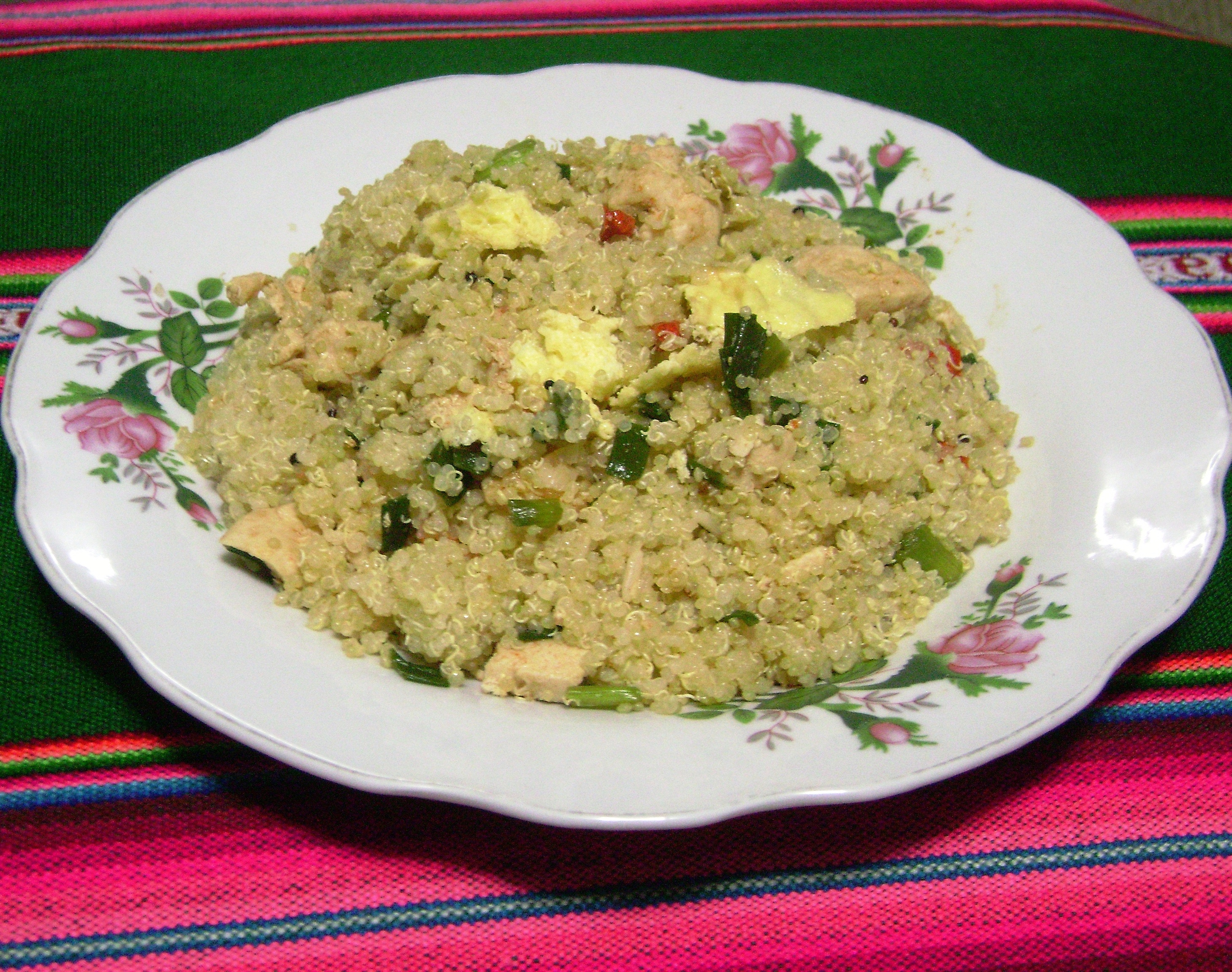 Quinua chaufa. Lima, Perú.